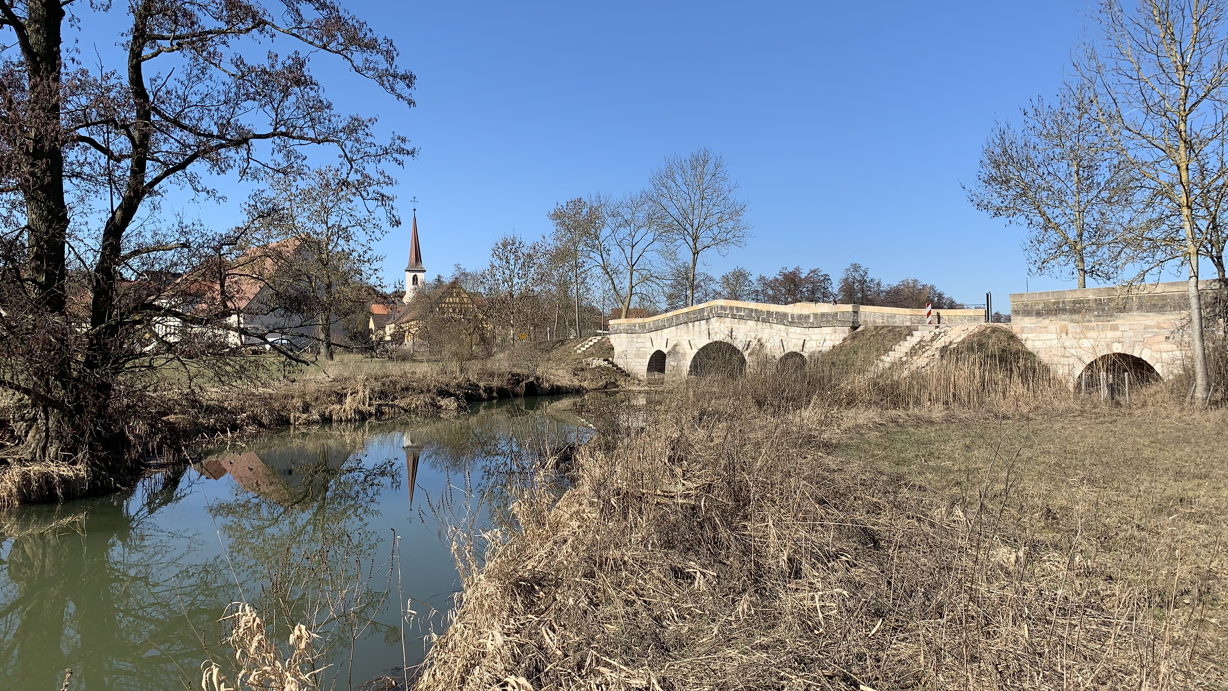 Das Foto zeigt die Altmühl und die Altmühlbrücke bei Jochsberg. Im Hintergrund sieht man das Dorf und die Kirche St. Mauritius.